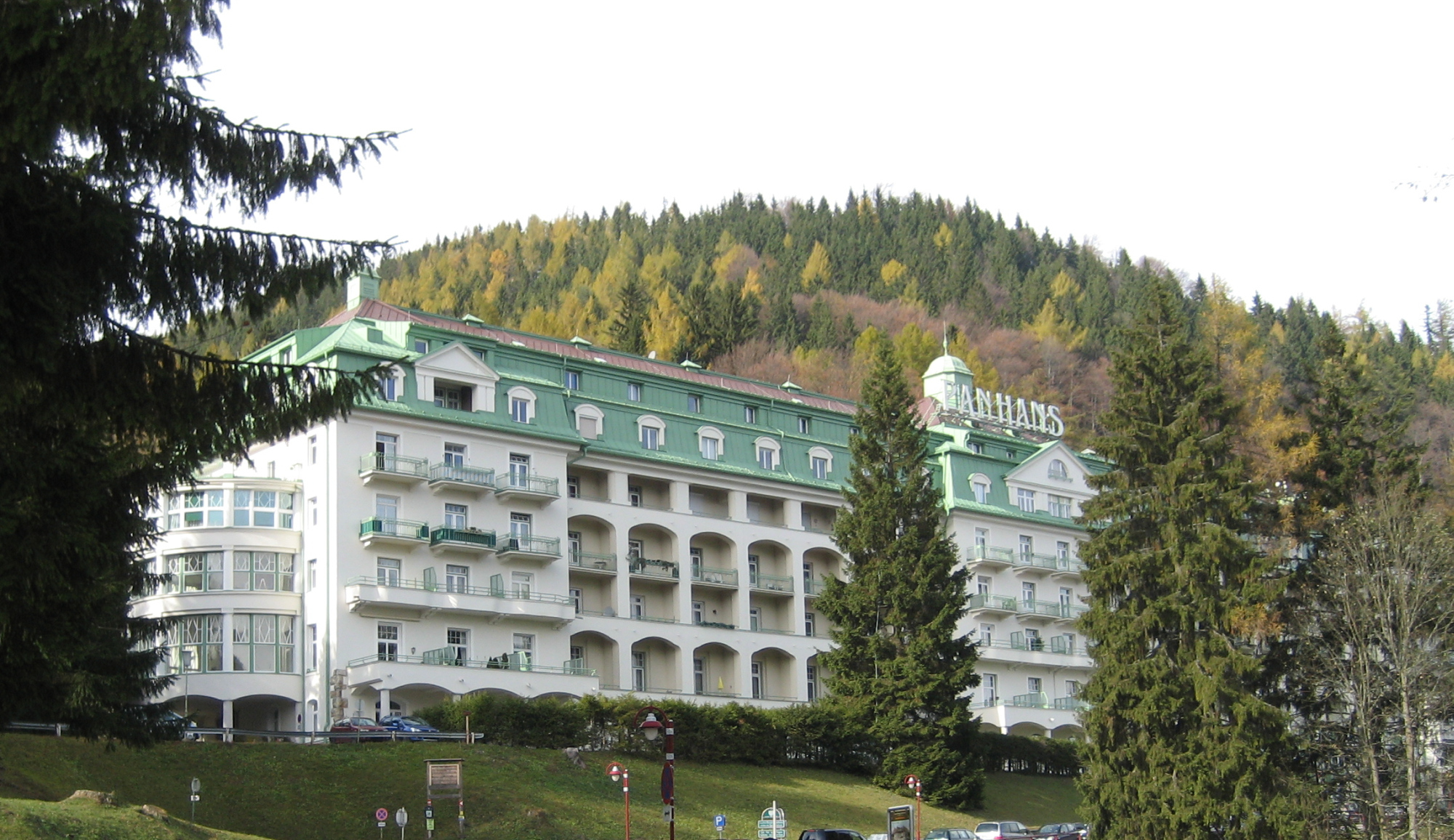 Hotel Panhans